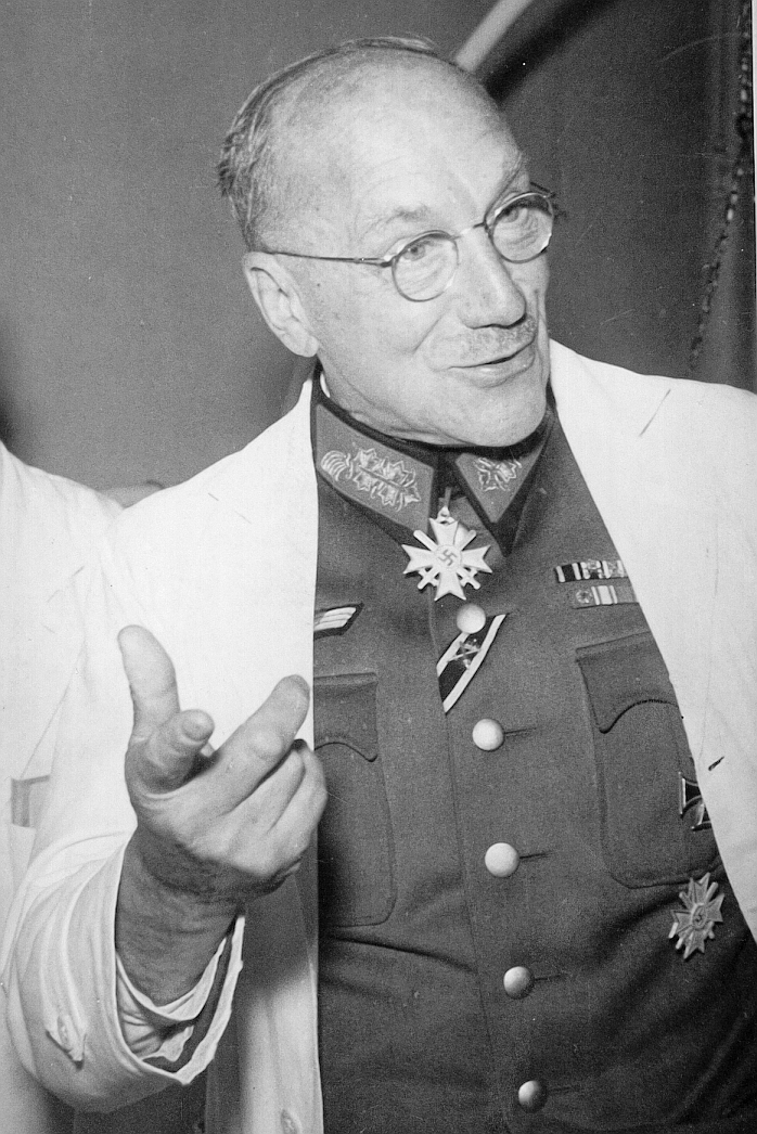 Visite de Sauerbruch en Belgique en 1943: une photo de famille